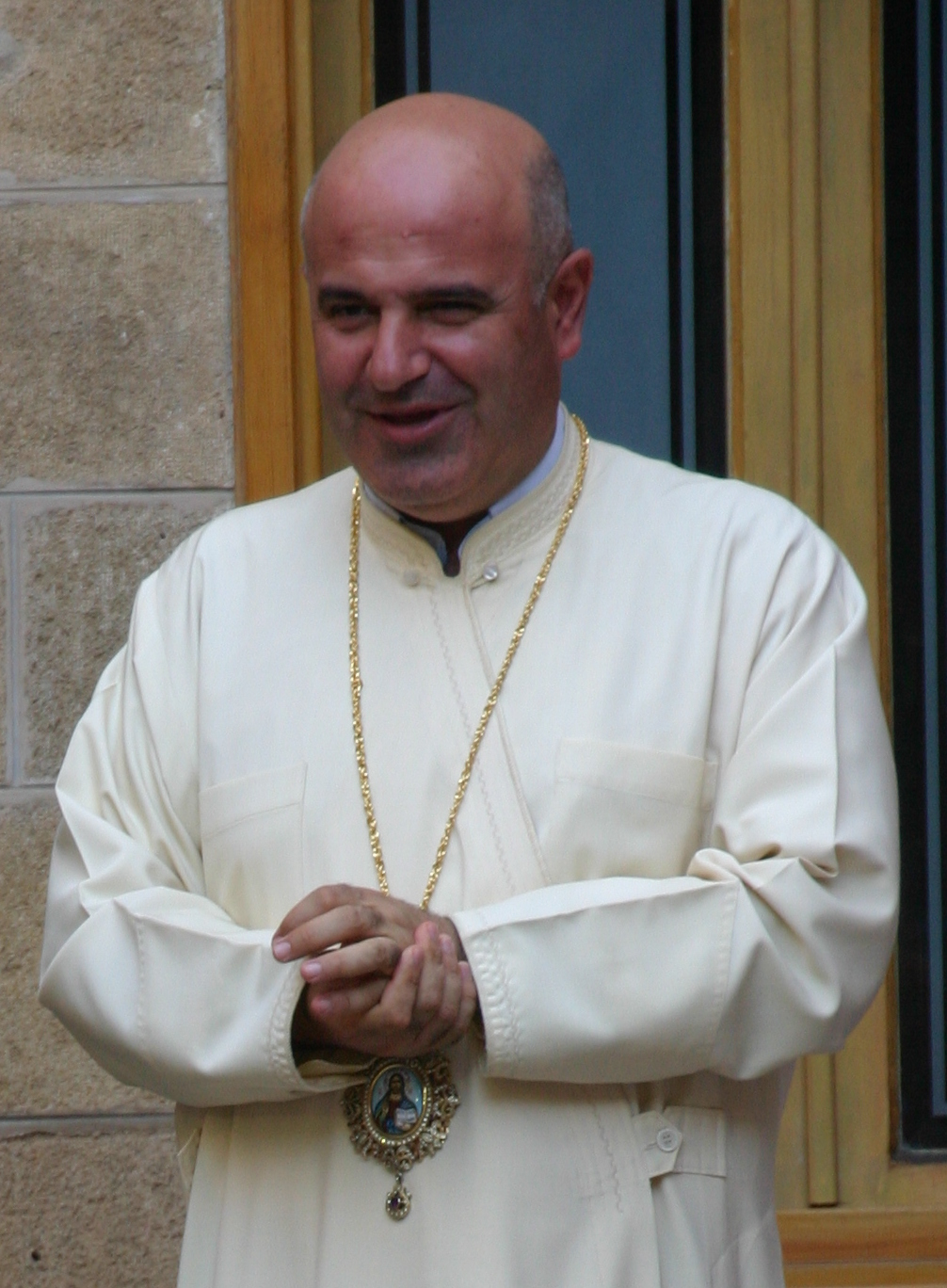 Mgr. Georges Bacouni Métropolite grec-melkite catholique de Tyr Recevant le groupe de L’Œuvre d’Orient à l’archevêché de Tyr le 18.09.2012. J.A. DESFORGES